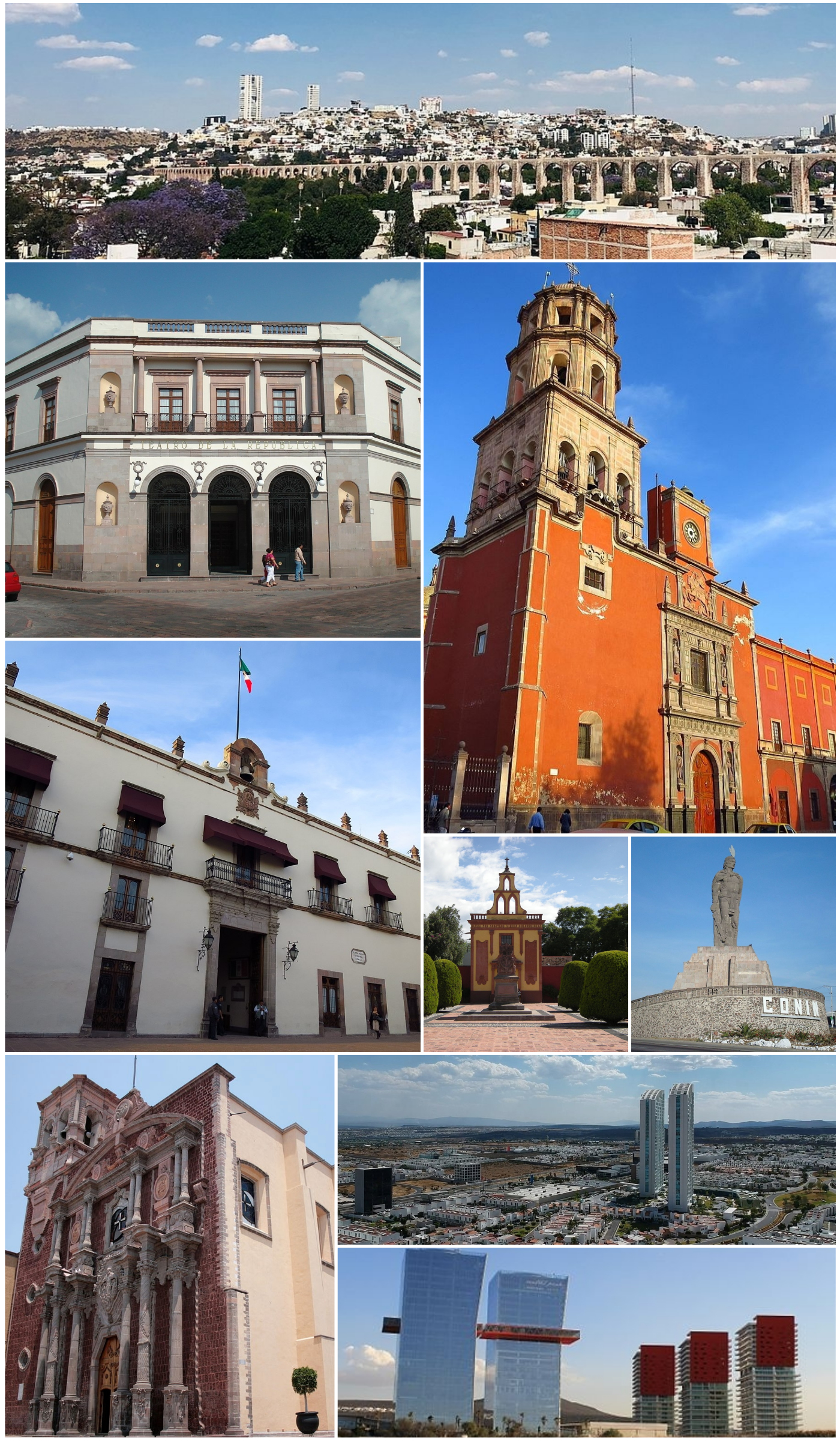 Santiago de Querétaro